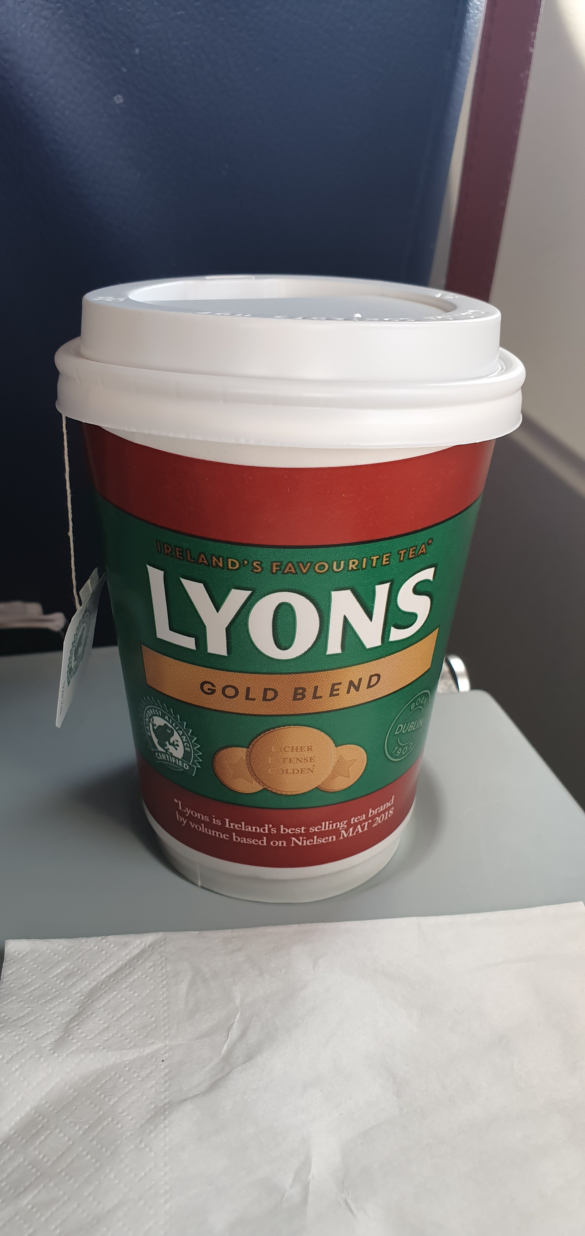 Gobelet de thé Lyons servi par Aer Lingus